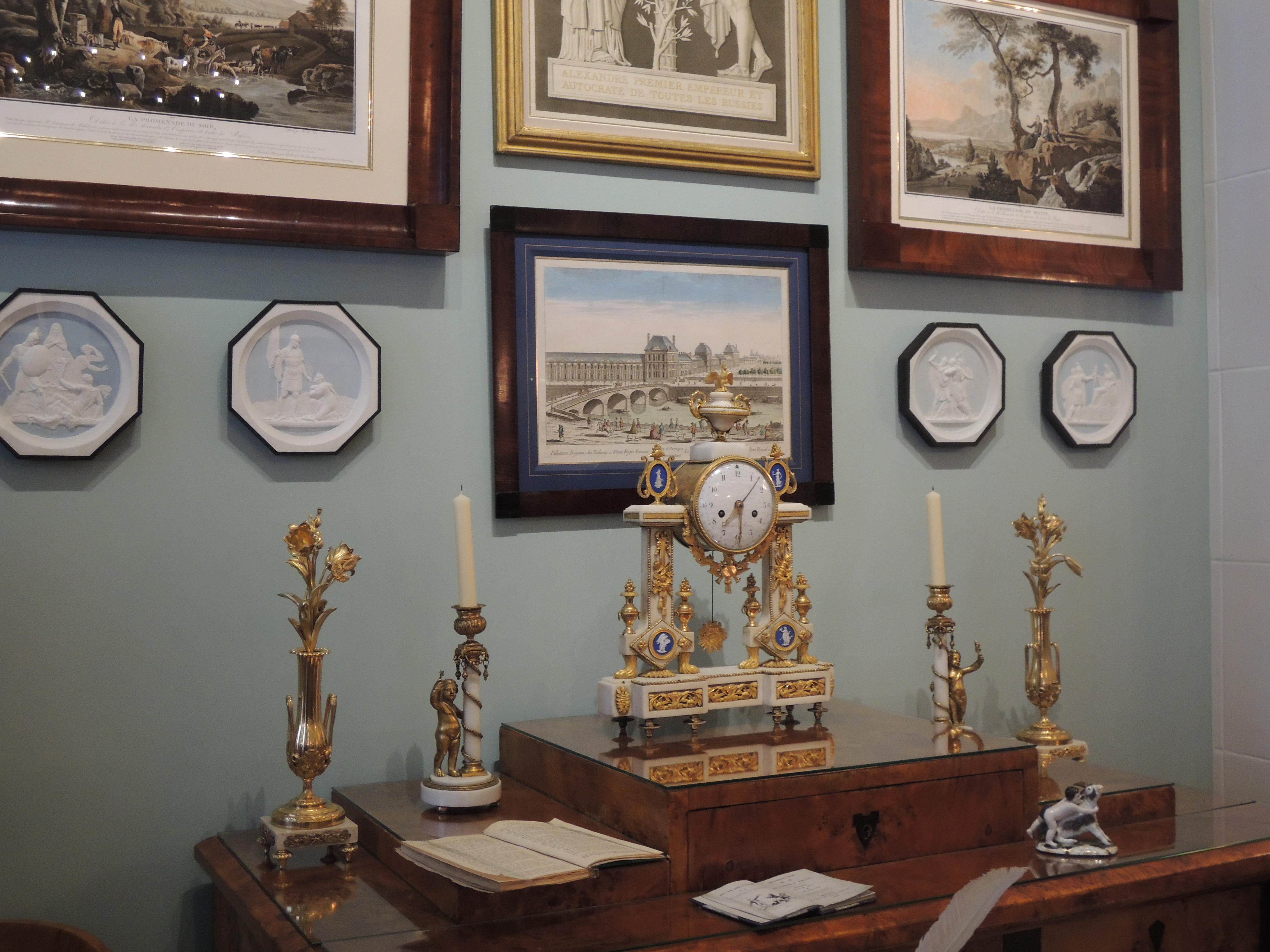 Дом-музей В. Л. Пушкина (филиал Государственного музея А. С. Пушкина) в день открытия 6 июня 2013 после масштабной реконструкции